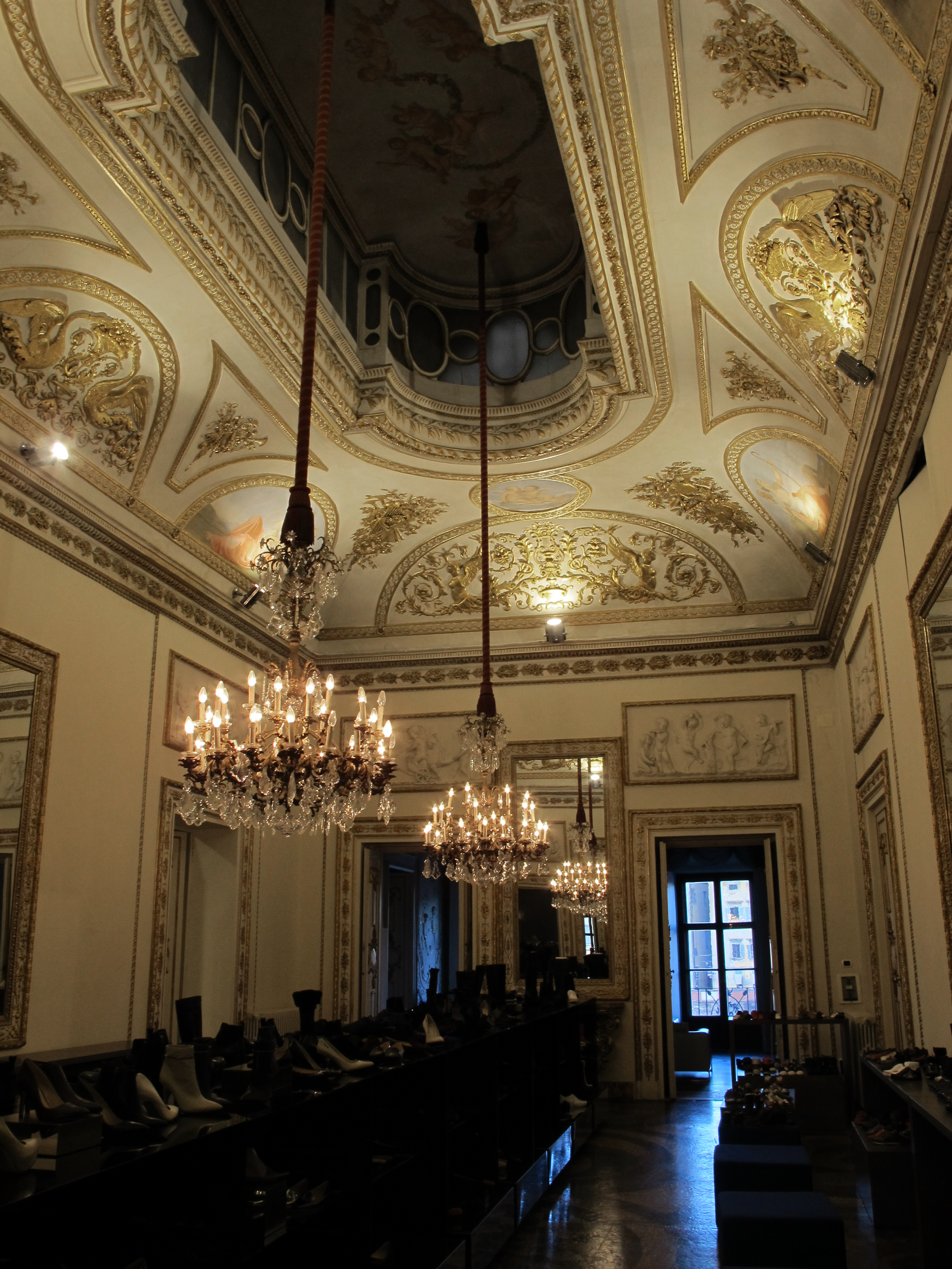 Palazzo Bardi-Guicciardini, piano nobile, galleria